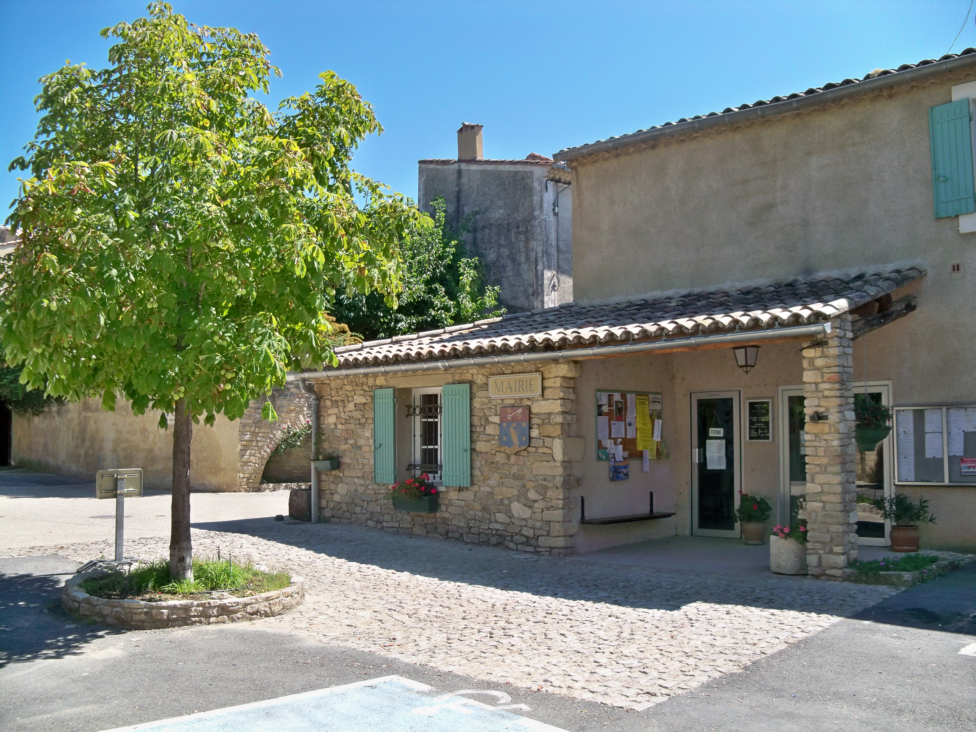 Mairie de Faucon, Vaucluse, France